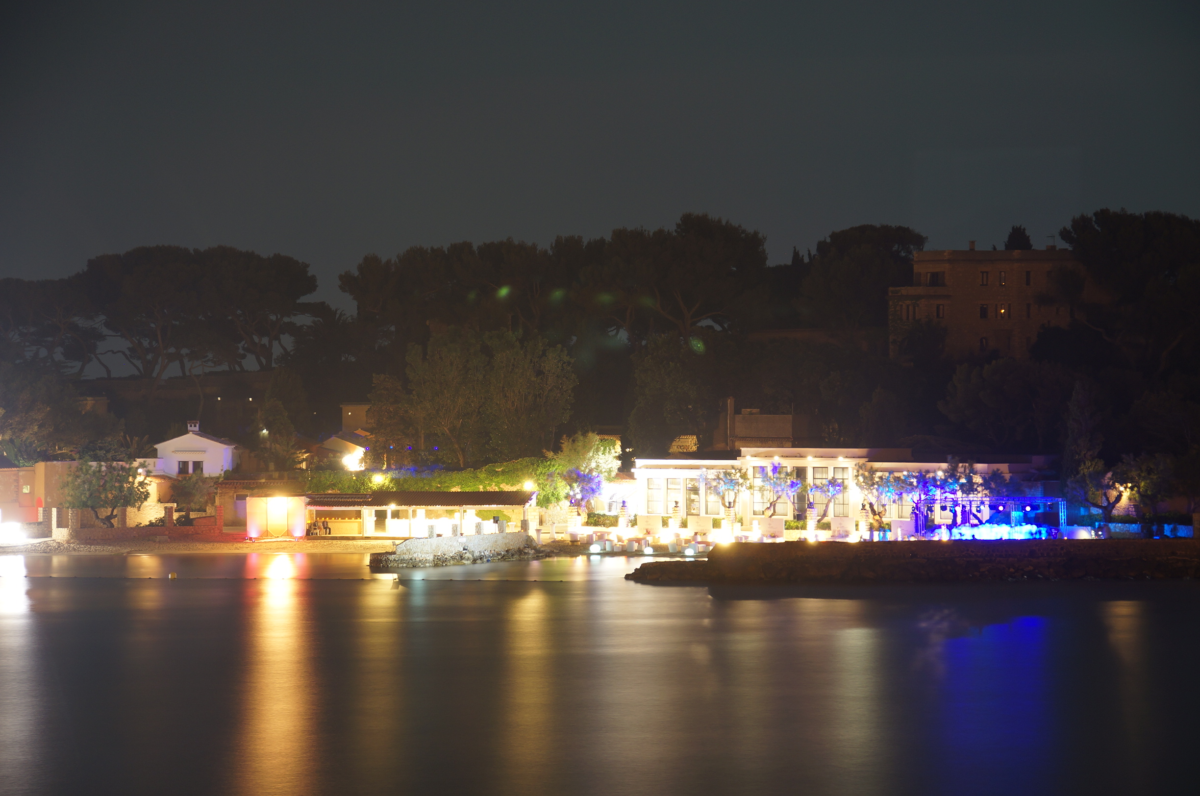 Bandol, France